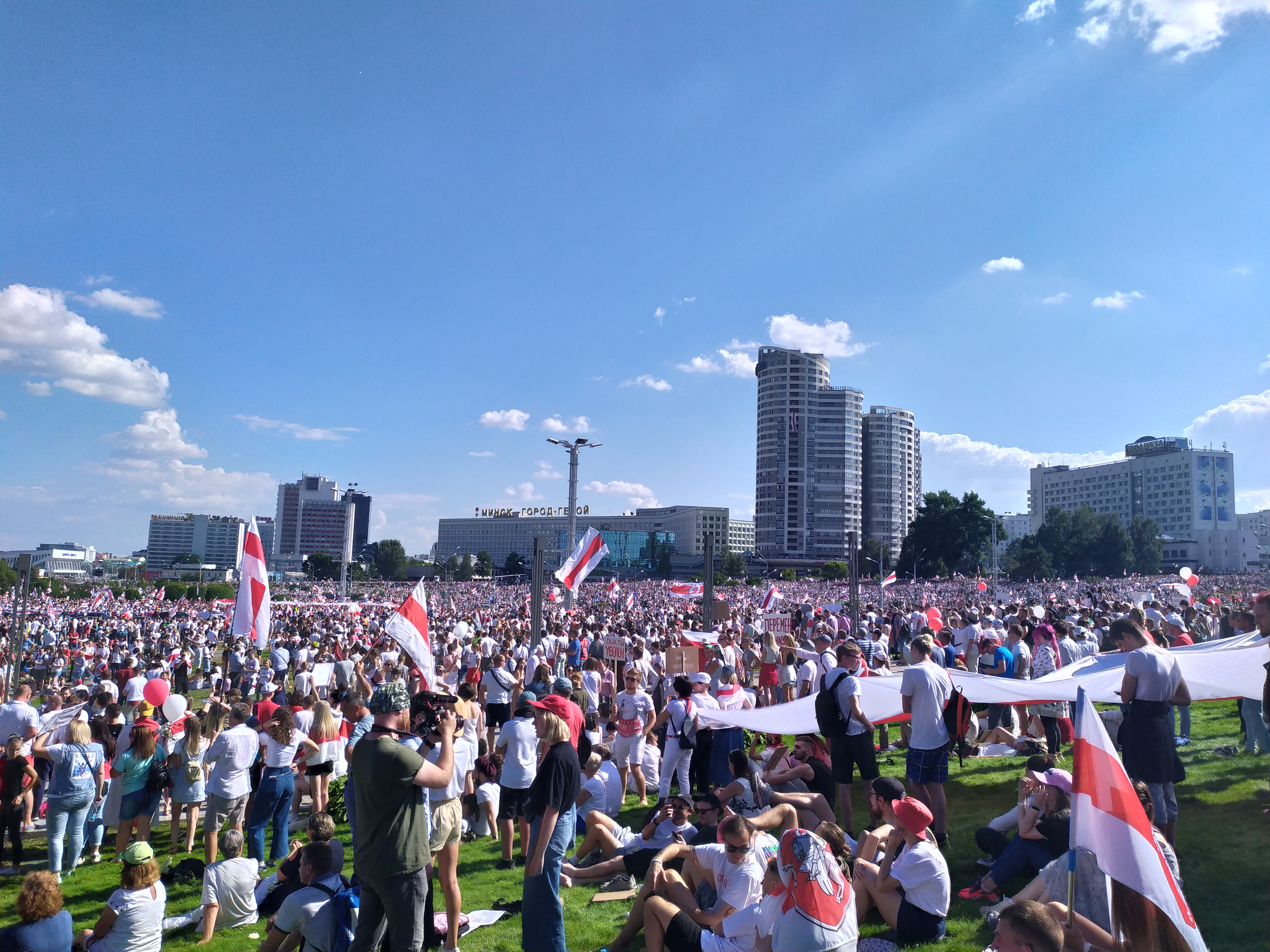 Митинги в Минске 2020-08-16